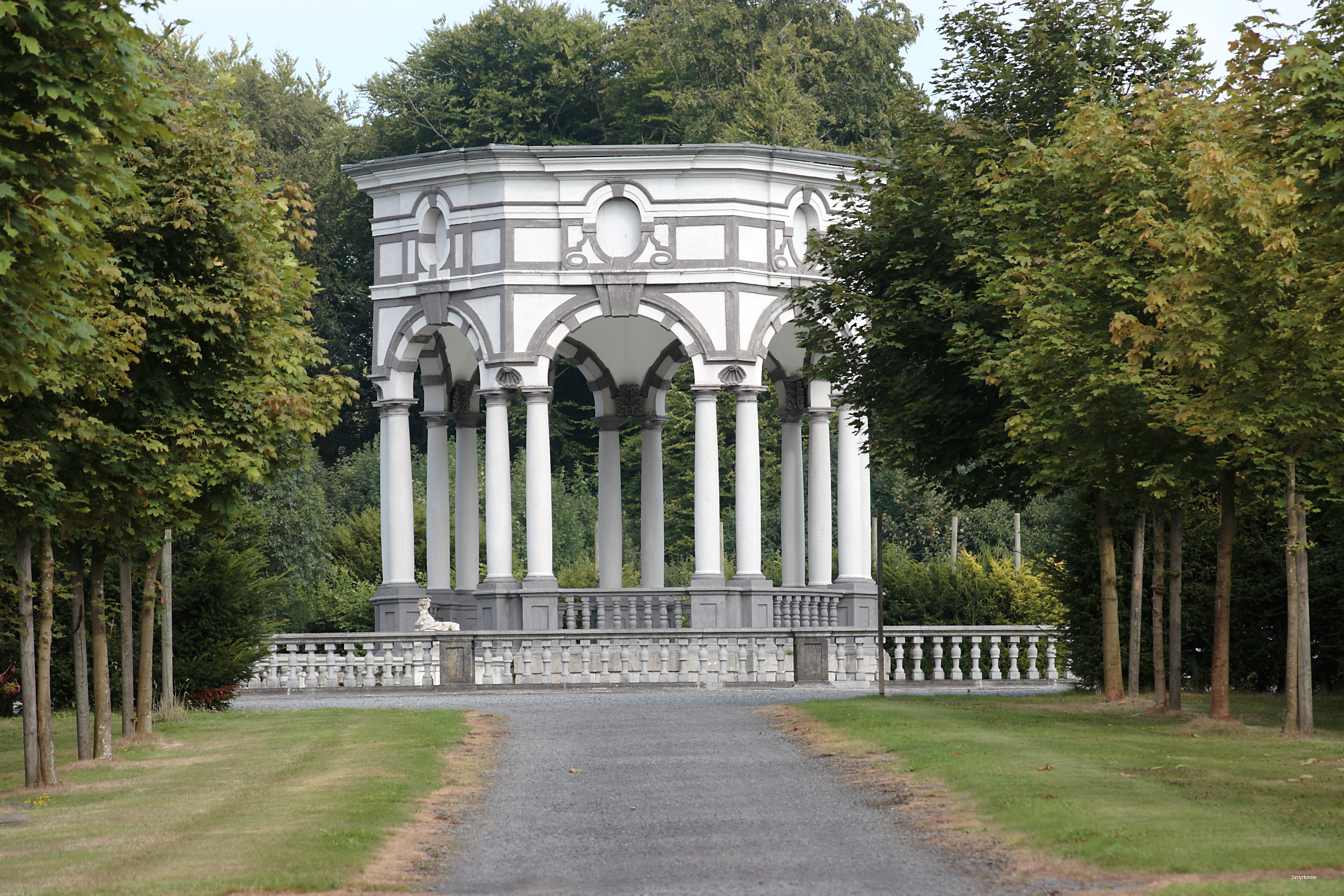 Ce pavillon est situé dans le parc de la commune d'Enghien. Il tient son nom au fait qu'il se trouve à la croisée de 7 allées parcourant le parc.